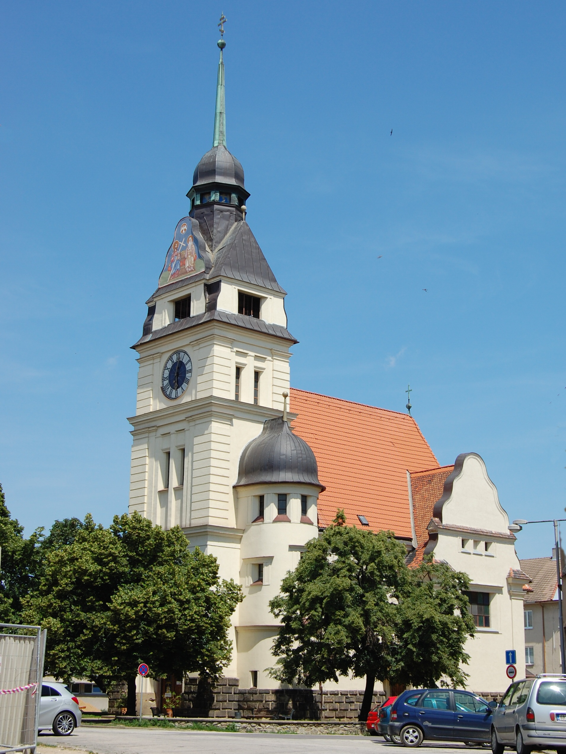 Kostel evangelický (Znojmo), Švermovo nám., Znojmo